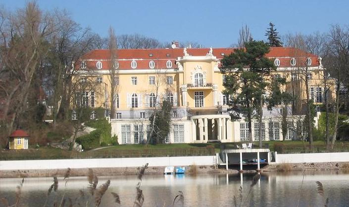 Villa Konschewski in Berlin-Grunewald, Gottfried-von-Cramm-Weg 33-37; erbaut 1922-1923 nach Entwurf des Architekten Oskar Kaufmann (auch „Oskar-Kaufmann-Villa“ genannt); Ansicht der Rückfront am Hundekehlesee